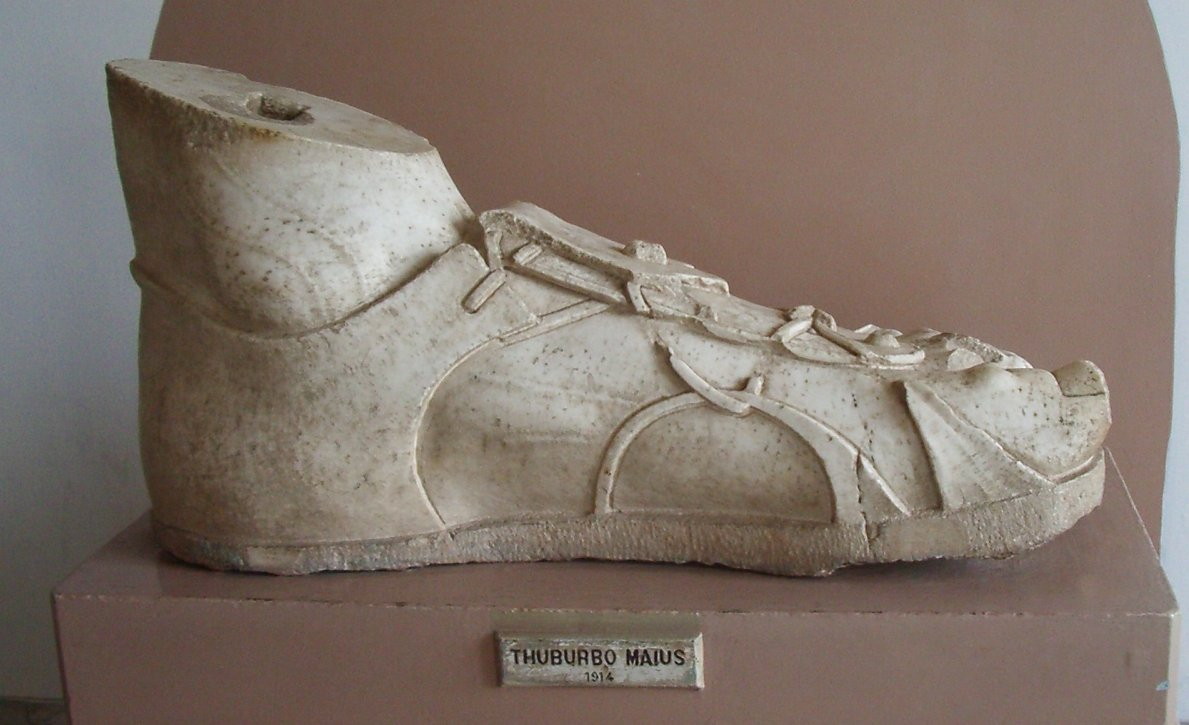 peu de pedra al Bardo Piede colossale, scultura romana III sec., ex Museo nazionale del Bardo, Tunisi.